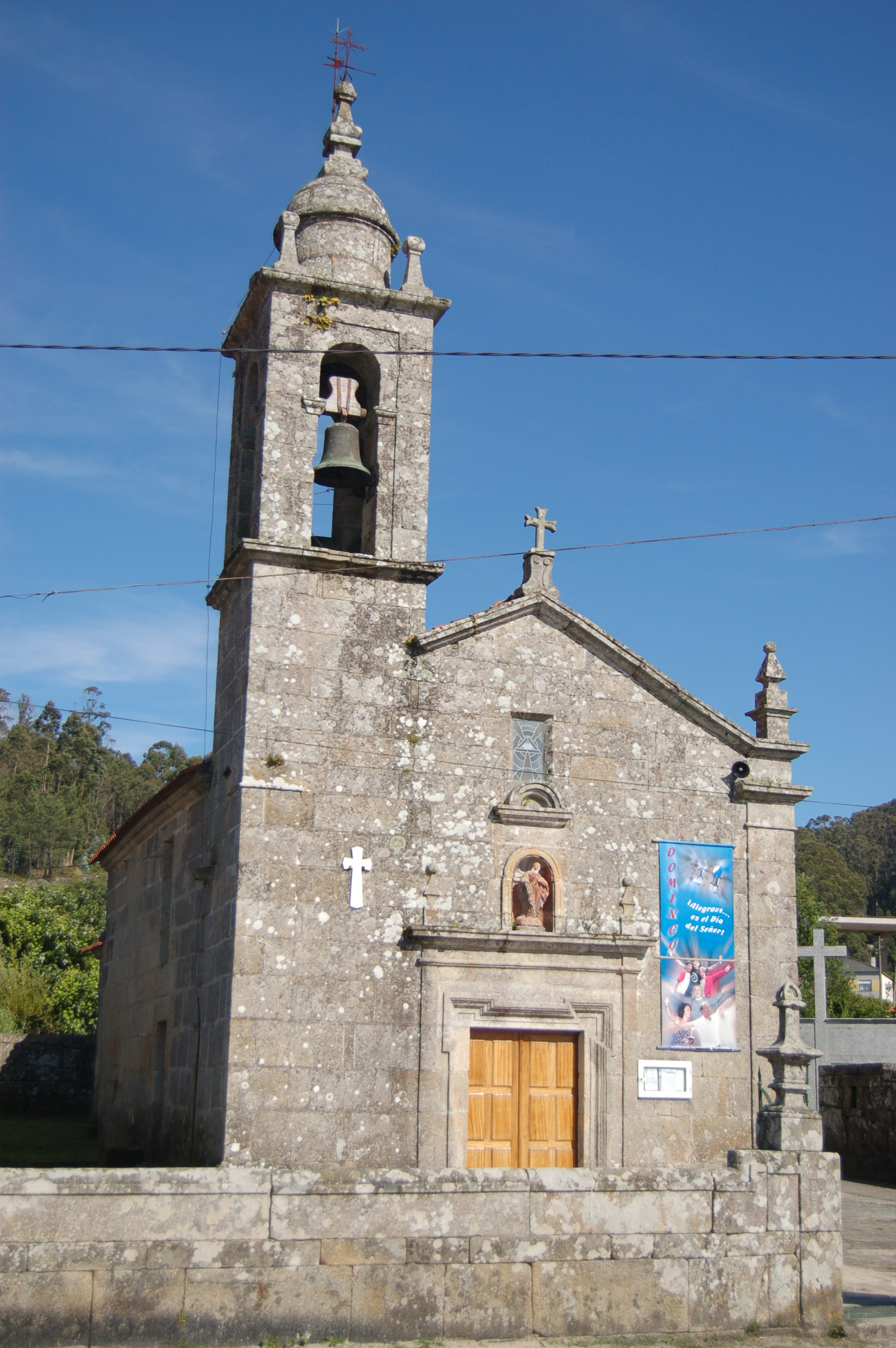 Igrexa parroquial de Santa Cristina de Covas (Meaño)